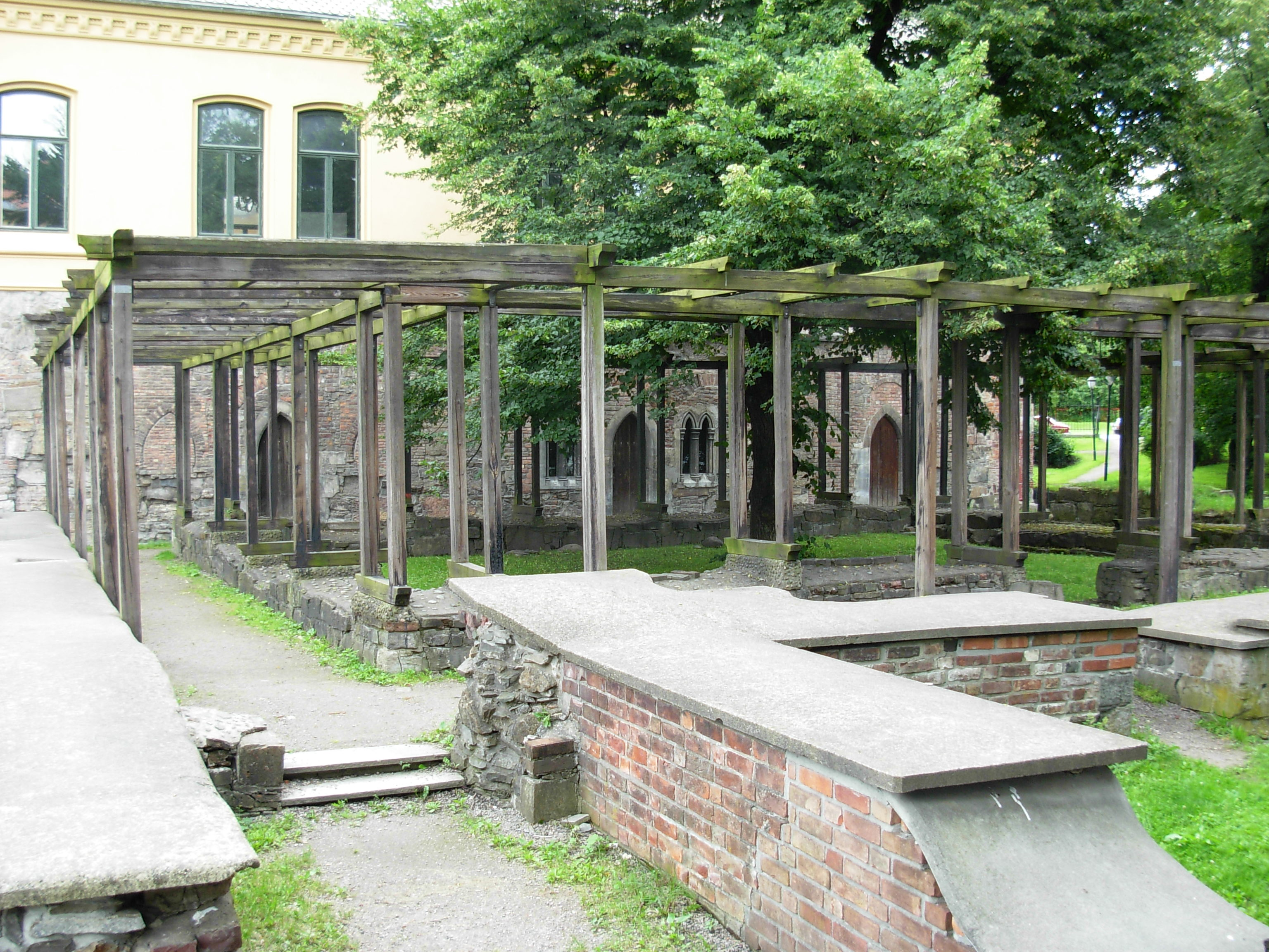 Ruinparken, Oslo, med Olavsklosteret